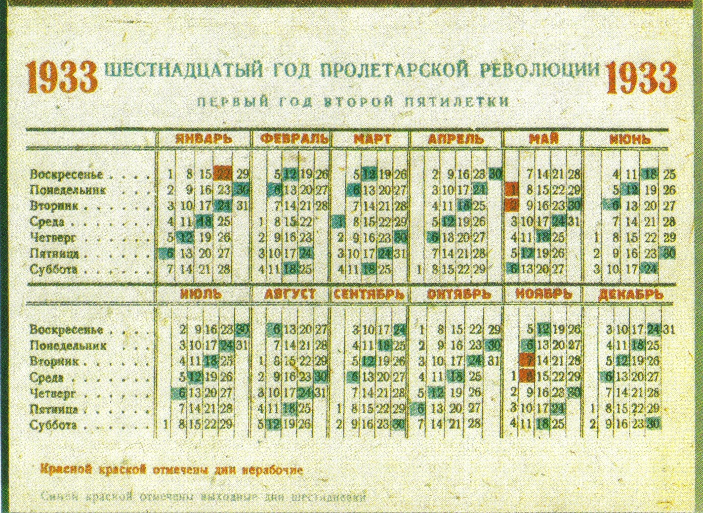 Soviet calendar for 1933 showing Gregorian months, traditional seven-day week, five national holidays, plus the six-day work week (five working days followed by one day of rest).